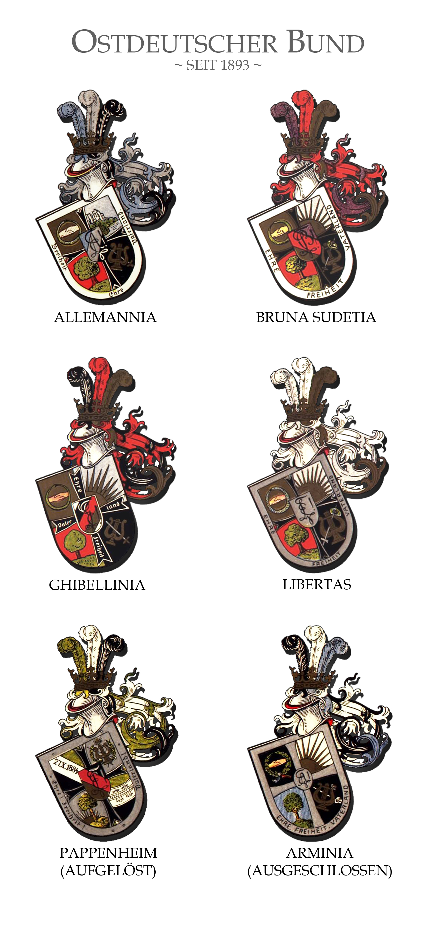 Wappentafel sämtlicher im Ostdeutschen Bund vereinten Burschenschaften. Historisch und aktuell.